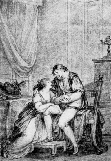 Egmont und Klärchen Zeichnung von Angelikas Kauffmann für Kupfer in Goethe Schriften Erste Fassung des bekannten Blattes in Goethes Nachlaß, aus früherem Besitz der Luise von Göchhausen. Angelika hat auch für die Göschensche Ausgabe der Werke die folgenden Blätter gezeichnet, die Johann Heinrich Lips gestochen hat.